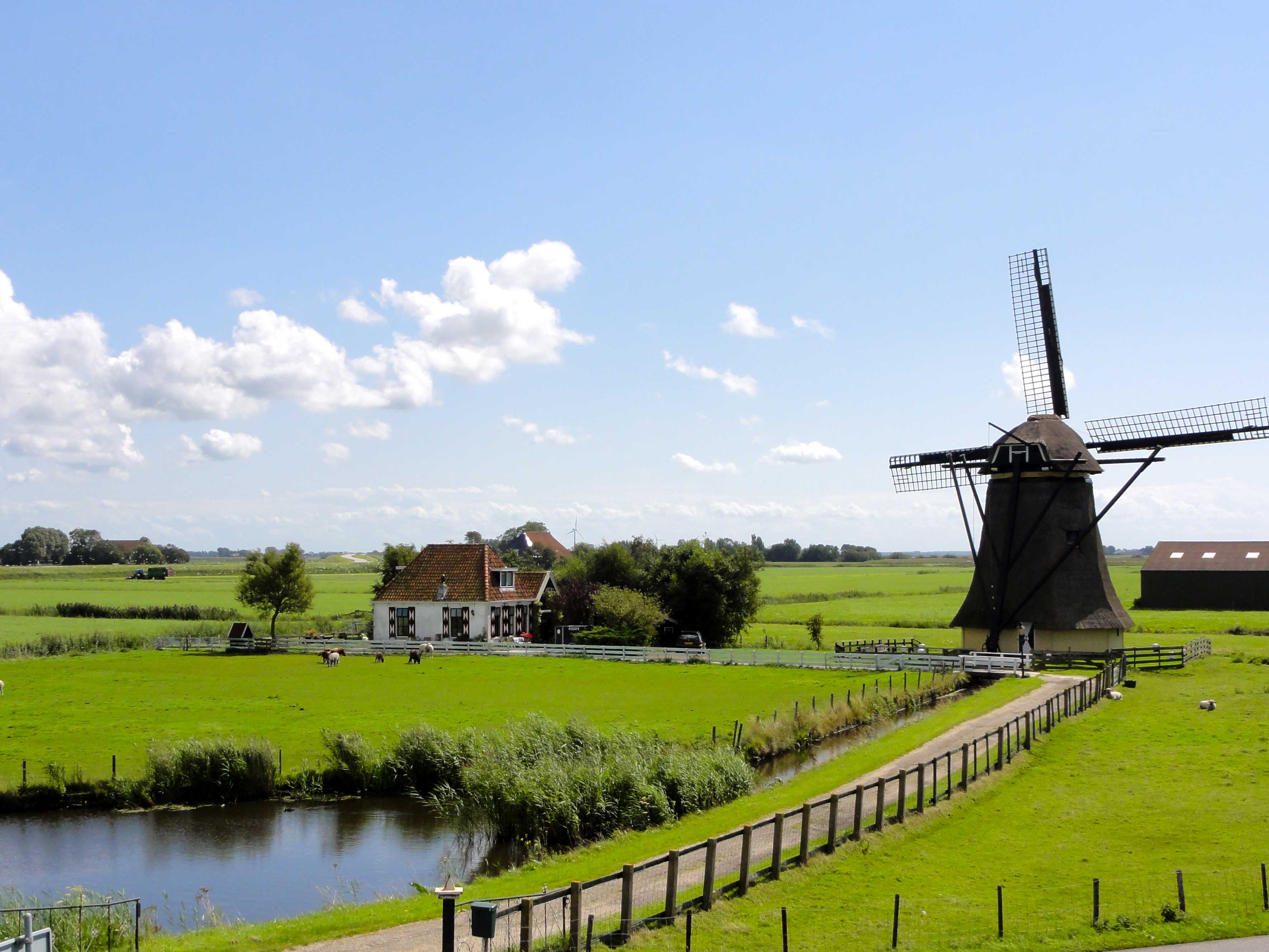 Nijlânnermolen nabij Workum